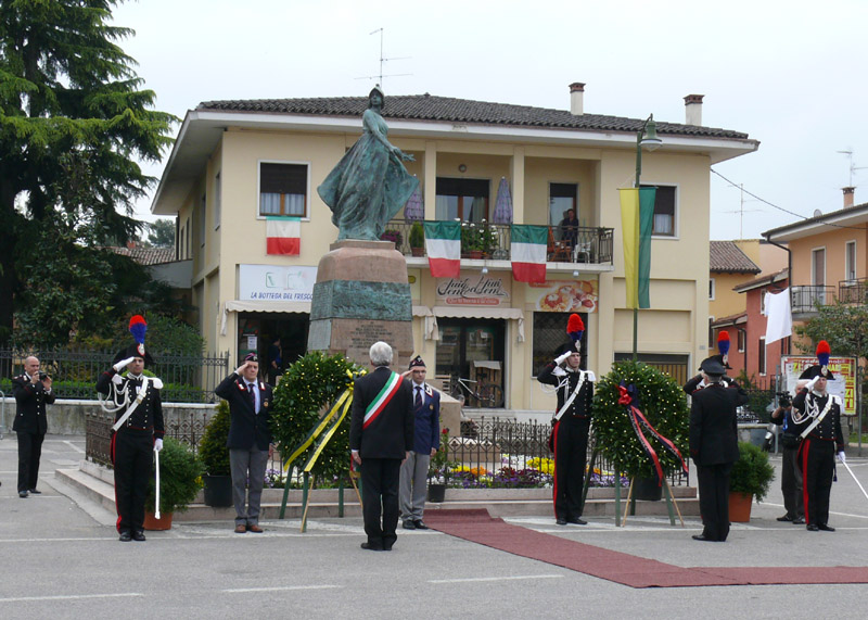 Pastrengo (Vr) 30.04.09 cerimonia per l'anniversario della carica dei Carabinieri